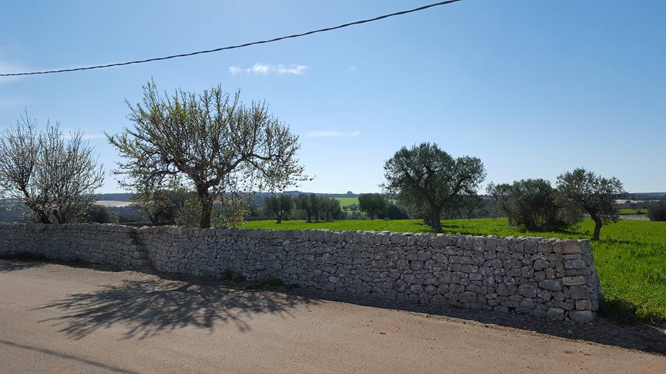 Tipica campagna turese. Foto scattata nei pressi di Monteferraro, tra Turi e Conversano.